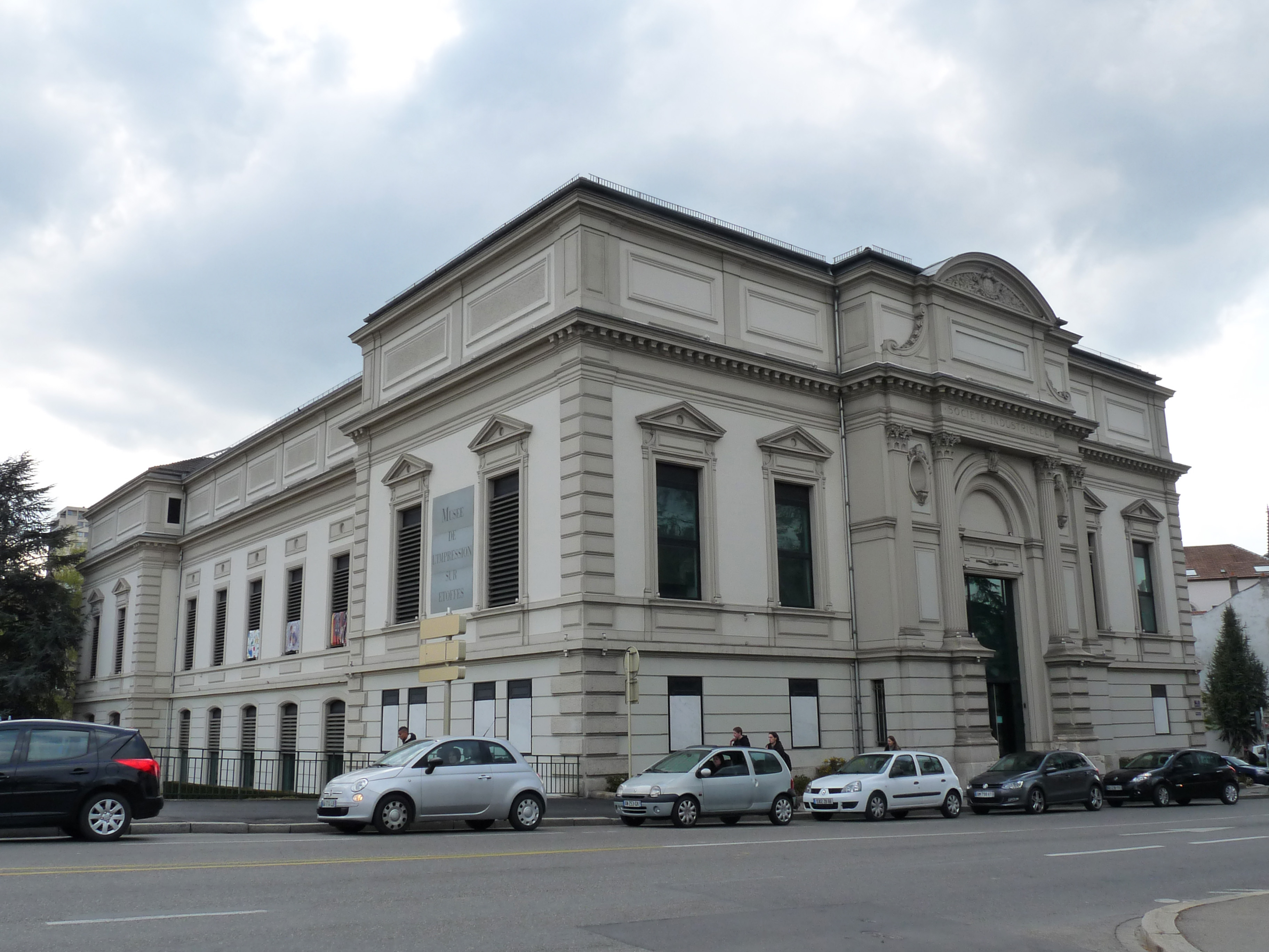 Mulhouse (Haut-Rhin) : façade latérale du Musée de l'impression sur étoffes, vue depuis la rue des Bonnes-Gens